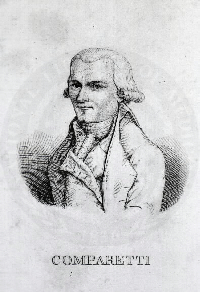 Andrea Comparetti (1745 – 1801)